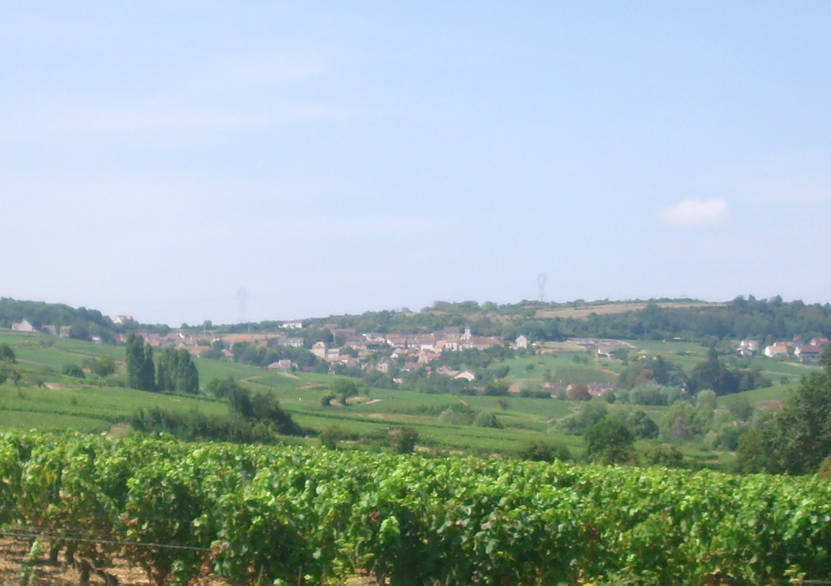 Vue du village de Montagny-lès-Buxy (71)